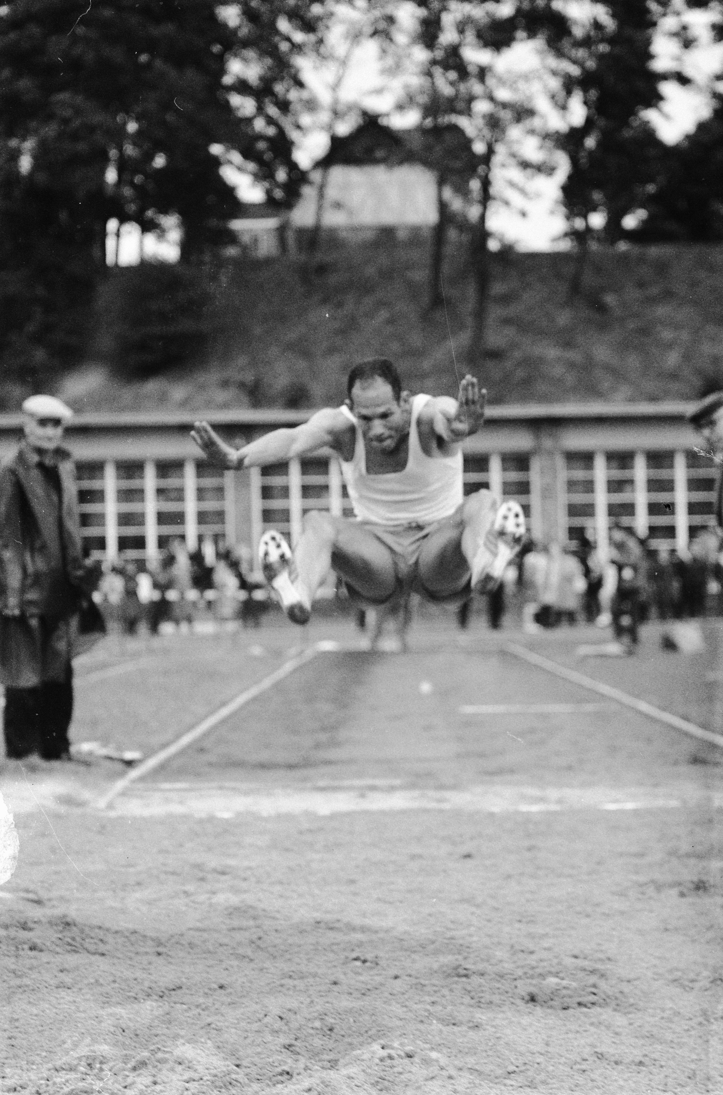 Landenontmoeting Belgie Nederland Zwitserland in Luik. Location: Luik